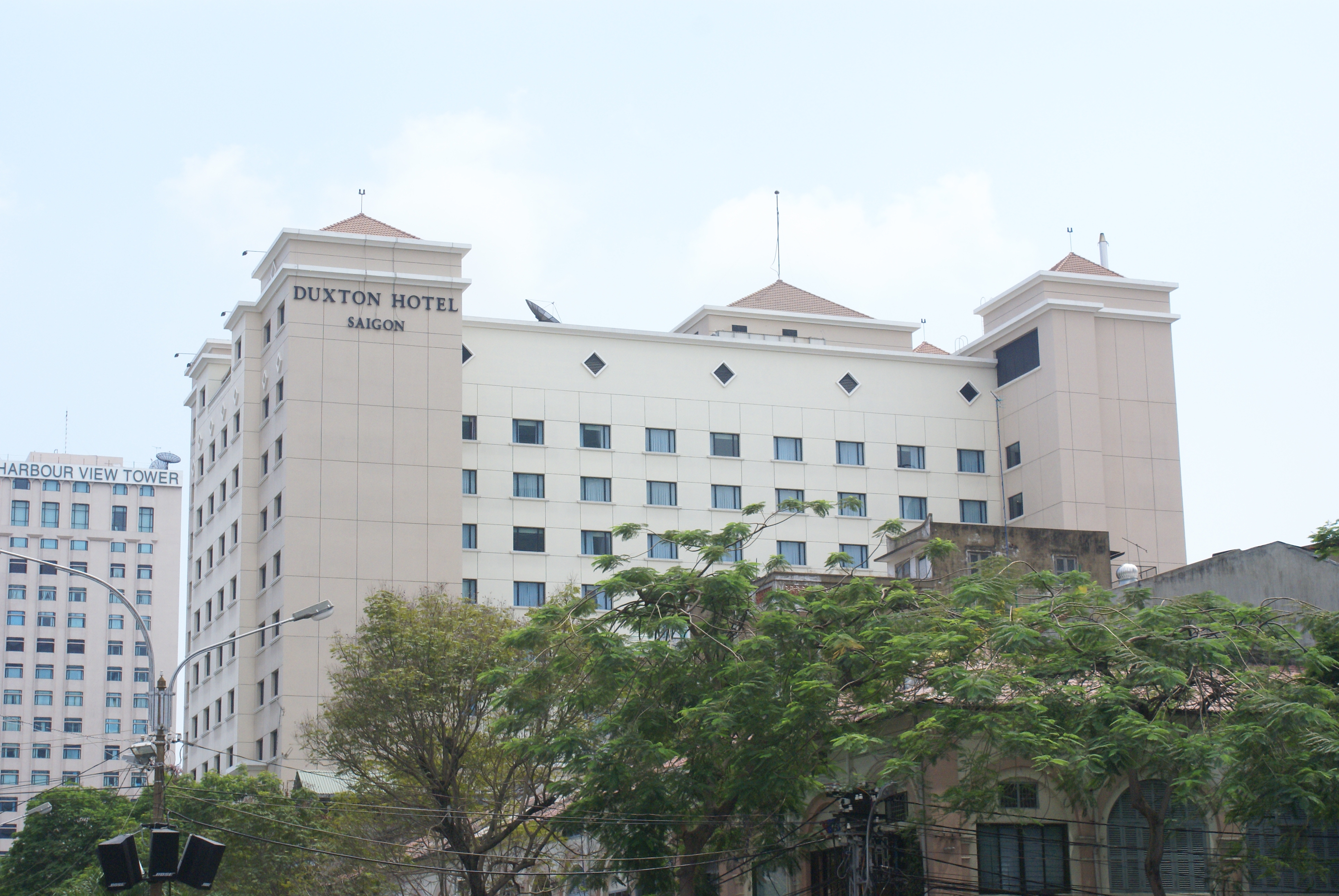 Duxton Hotel, HCMC.